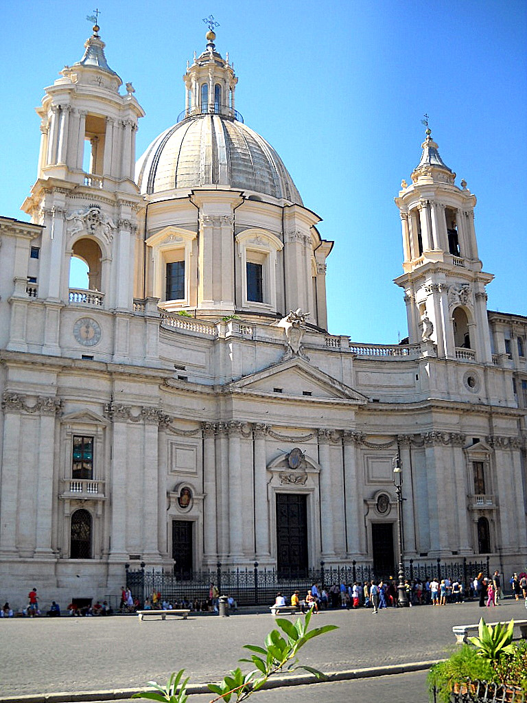 Roma Chiesa S Agnese in Agone uno